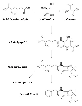 Biosíntesis penicil·lina